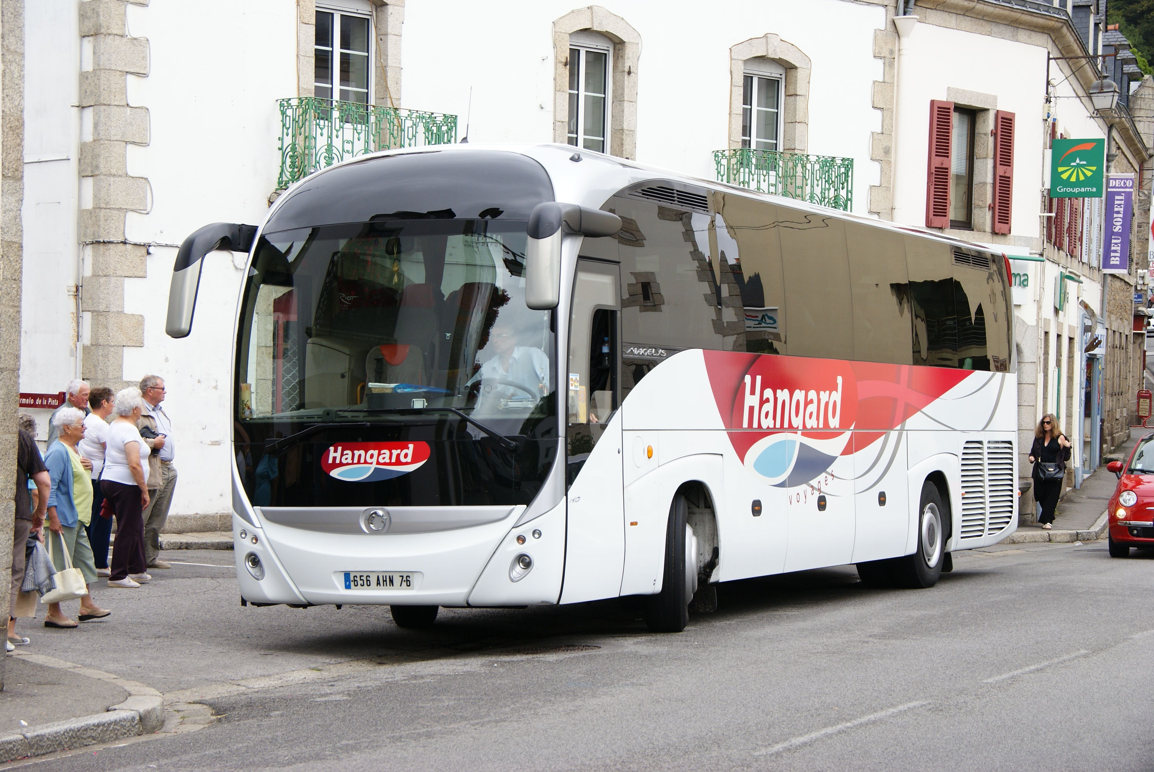 Irisbus Magelys de l'entreprise Hangard